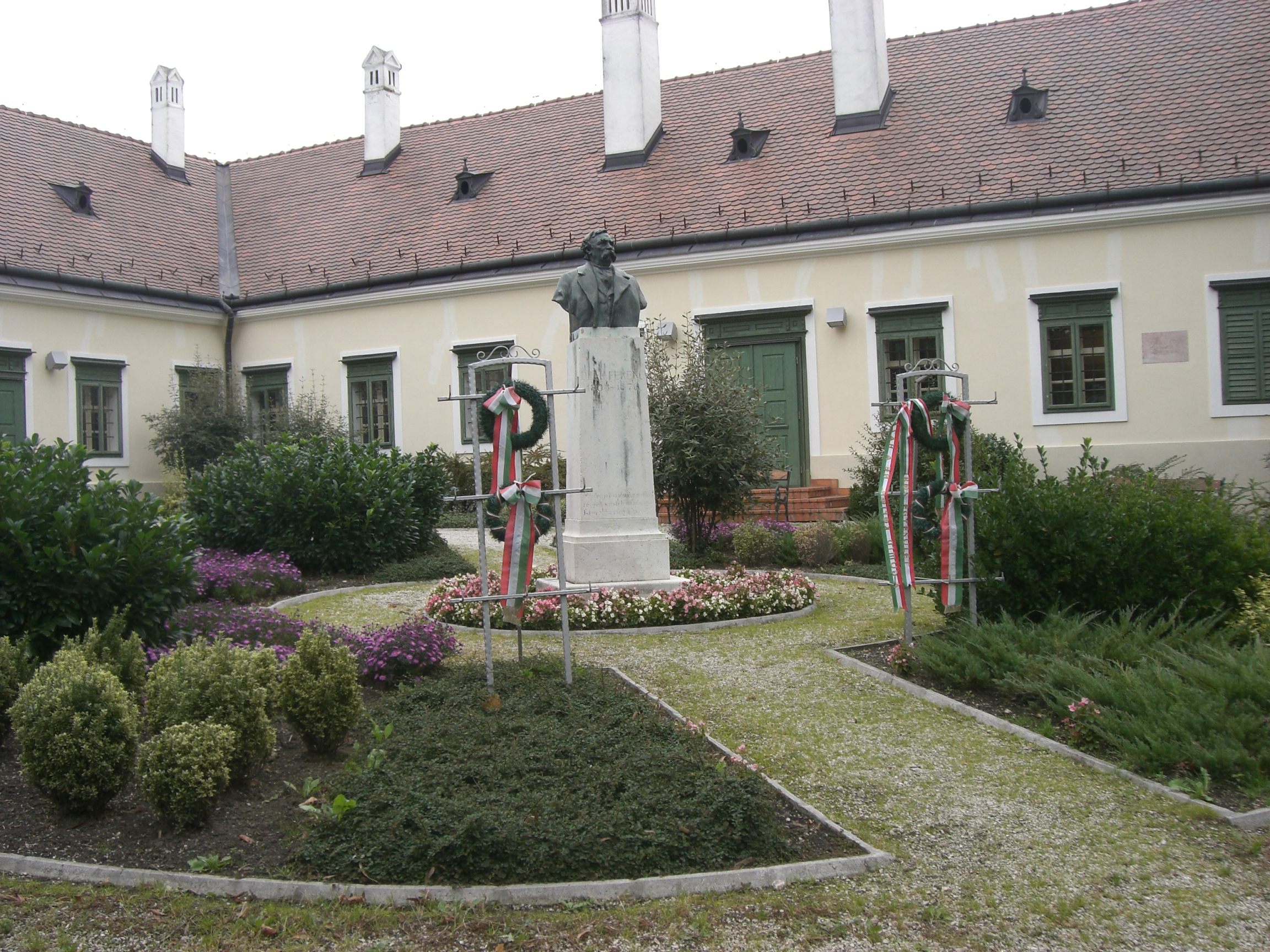 A kehidai Deák-kúria